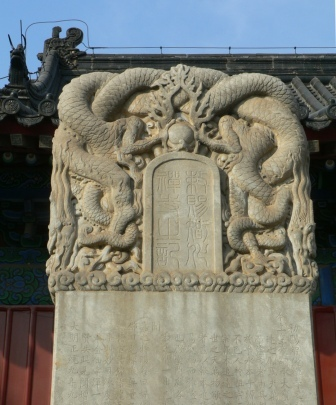 负屃 拍摄 （有说是螭首）